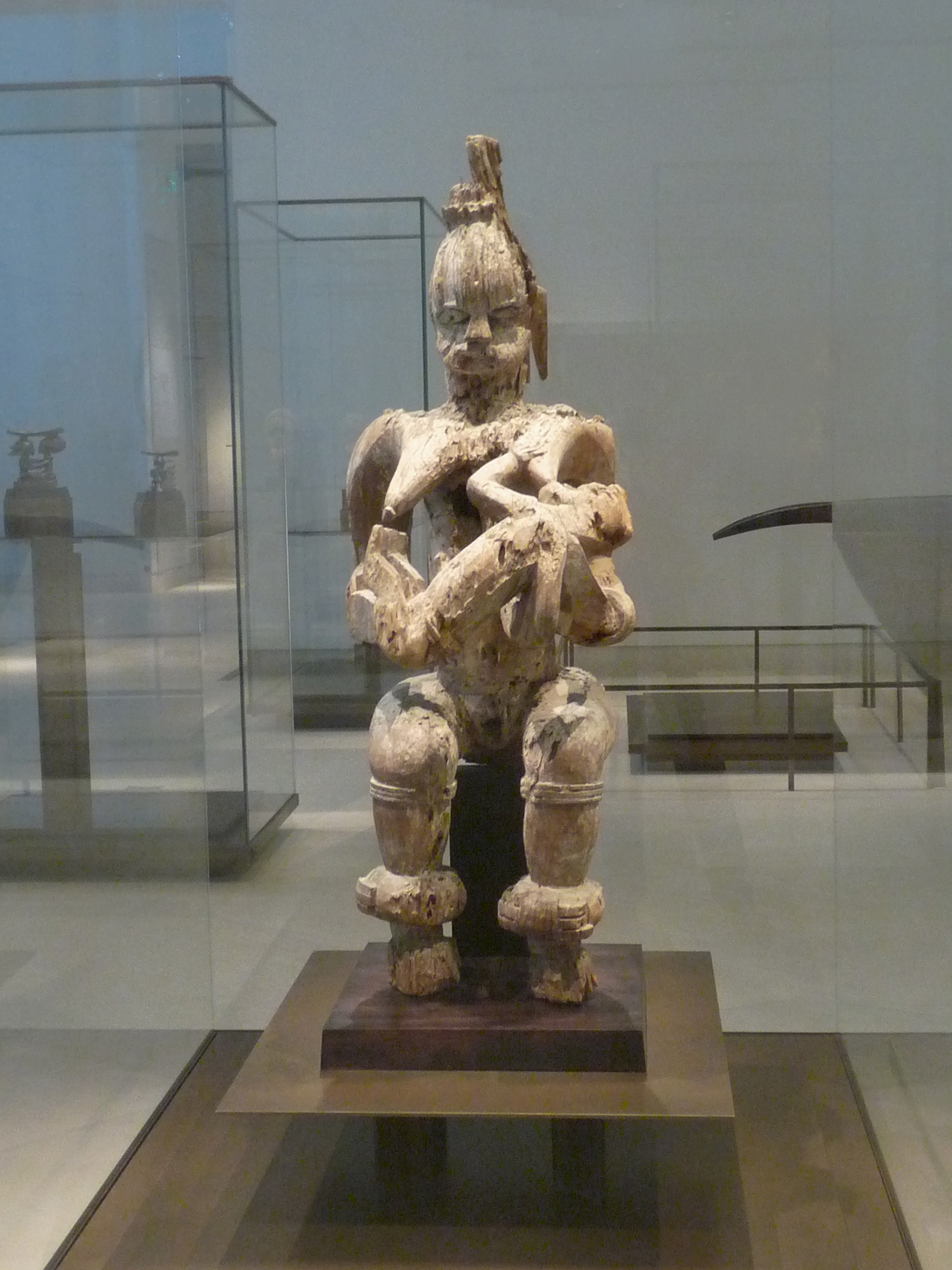 Sculpture urhobo en bois : figure de l'Emetejevwe, nièce du fondateur de la ville d'Eherhe. 18e siècle, Nigeria. Pavillon des Sessions, Louvre, Paris.